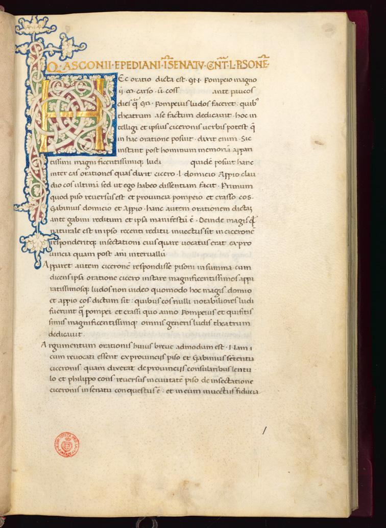 Asconius, guld, håndskrift